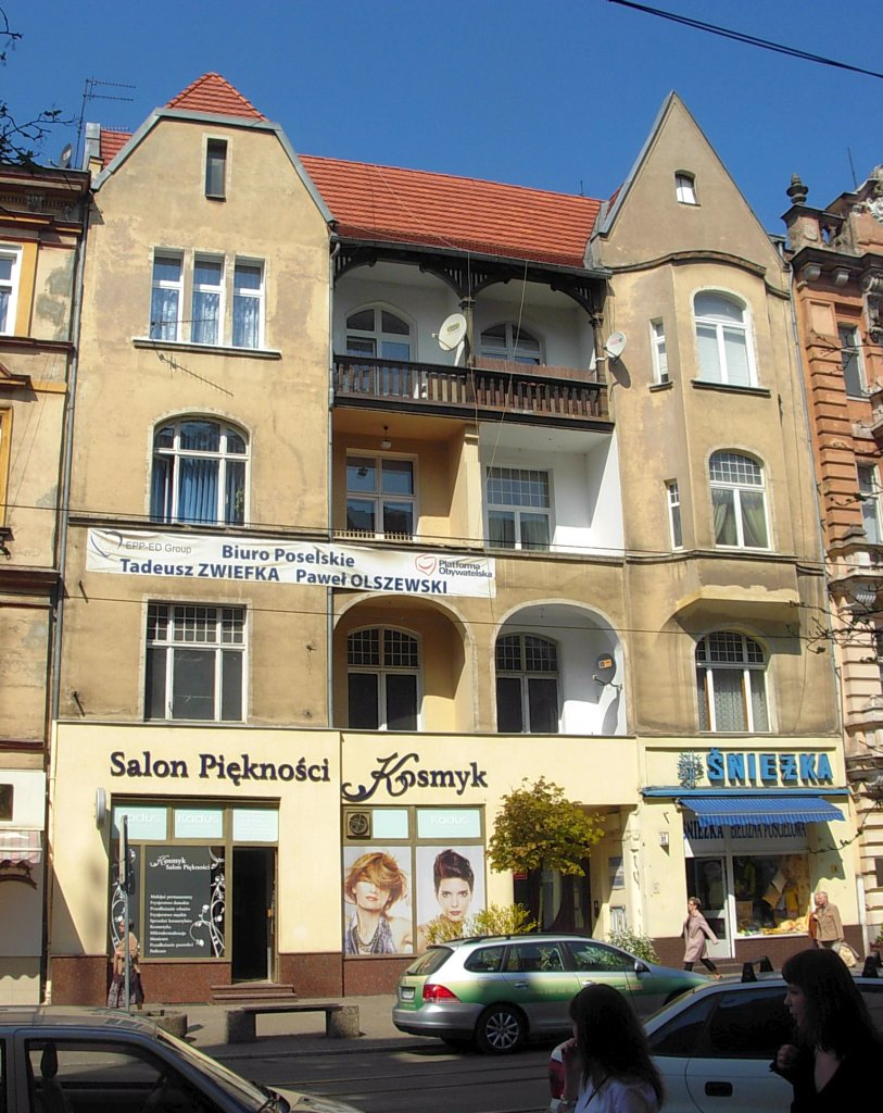 Kamienica ul. Gdańska 31 w Bydgoszczy